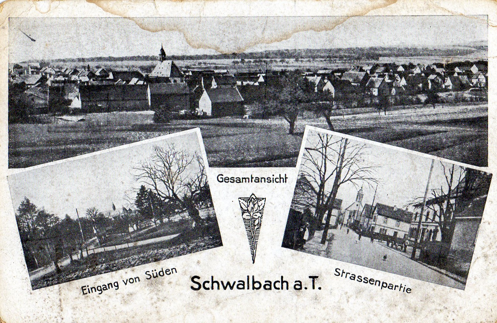 Alte Ansichtskarte von Schwalbach am Taunus um 1920